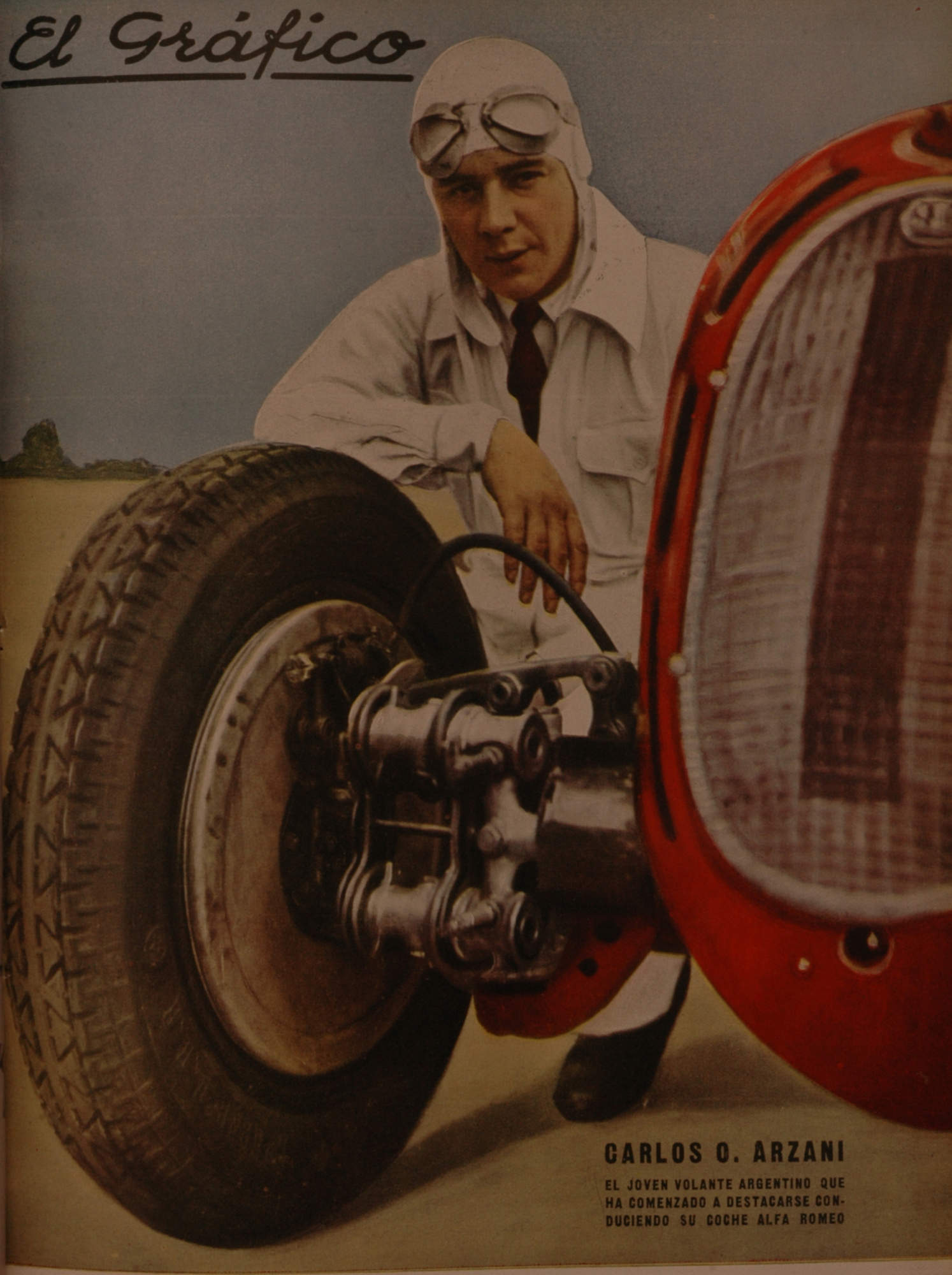 El Grafico del 28 de Noviembre de 1936. Edicion 907